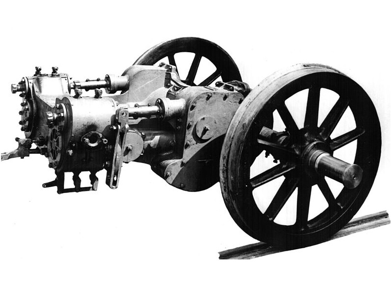 Dampfmaschine 50PS von De Dion Bouten